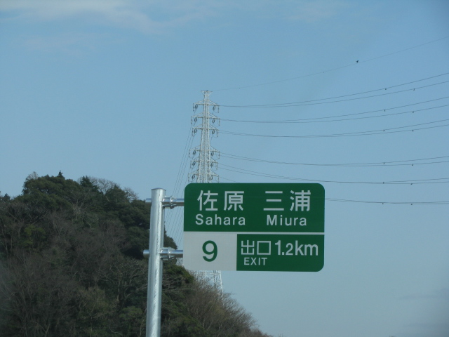 2009年3月20日、佐原インター付近で撮影